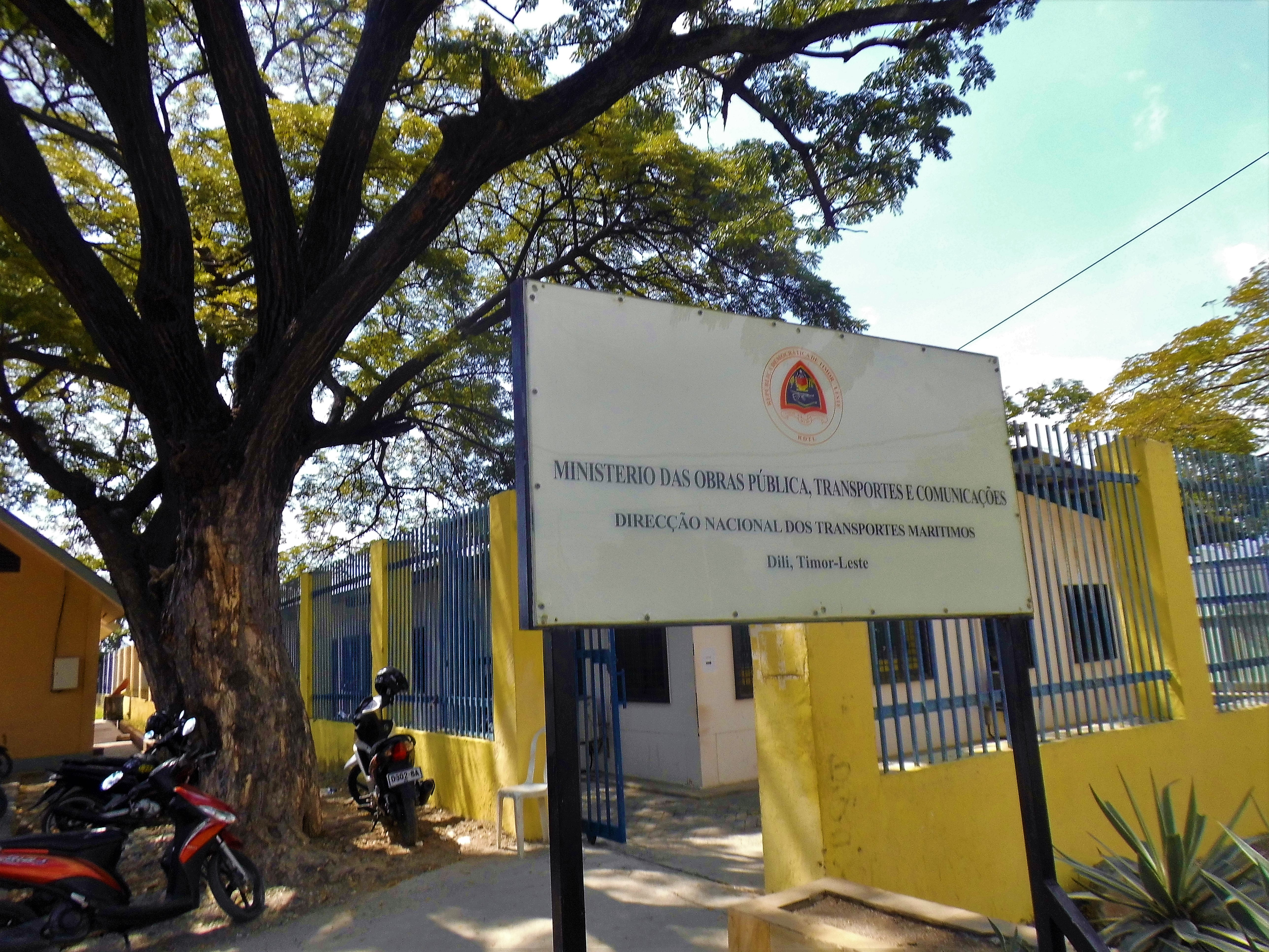 Direção Nacional dos Transportes Maritimos